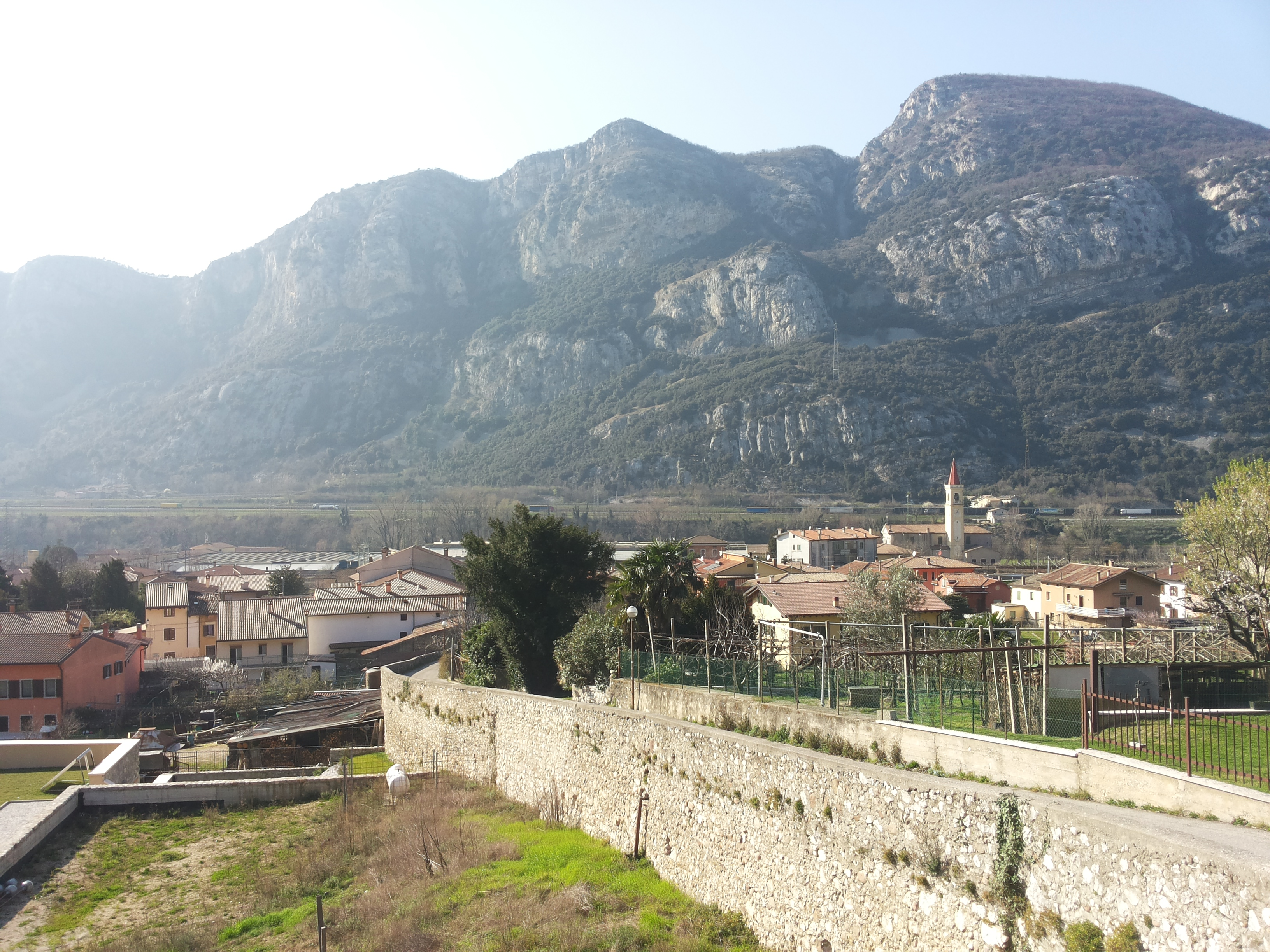 Dolcè (provincia di Verona)